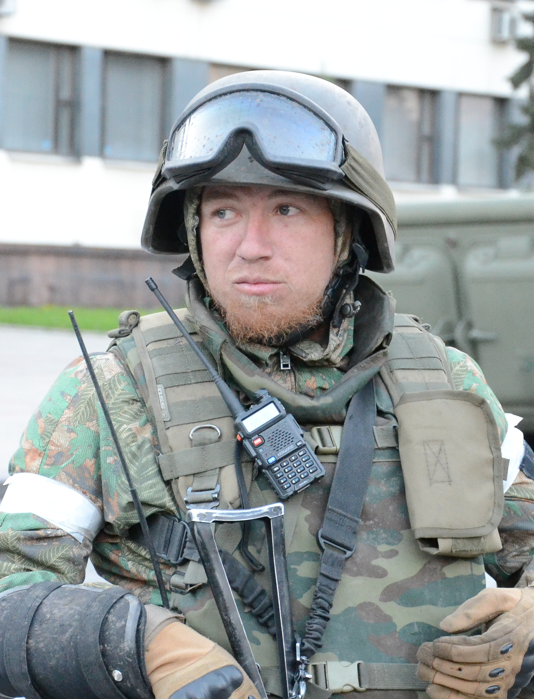 Арсений Павлов на репетиции парада в честь дня Победы в Донецке